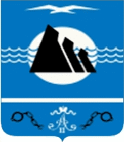 Герб Александровск-Сахалинского района Сахалинской области (2007 года)